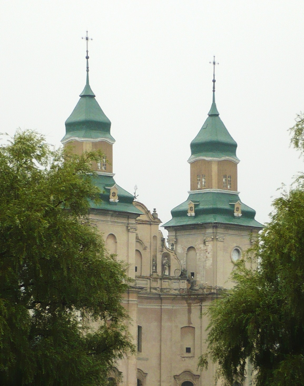 Zbaraż, kościół oo. bernardynów